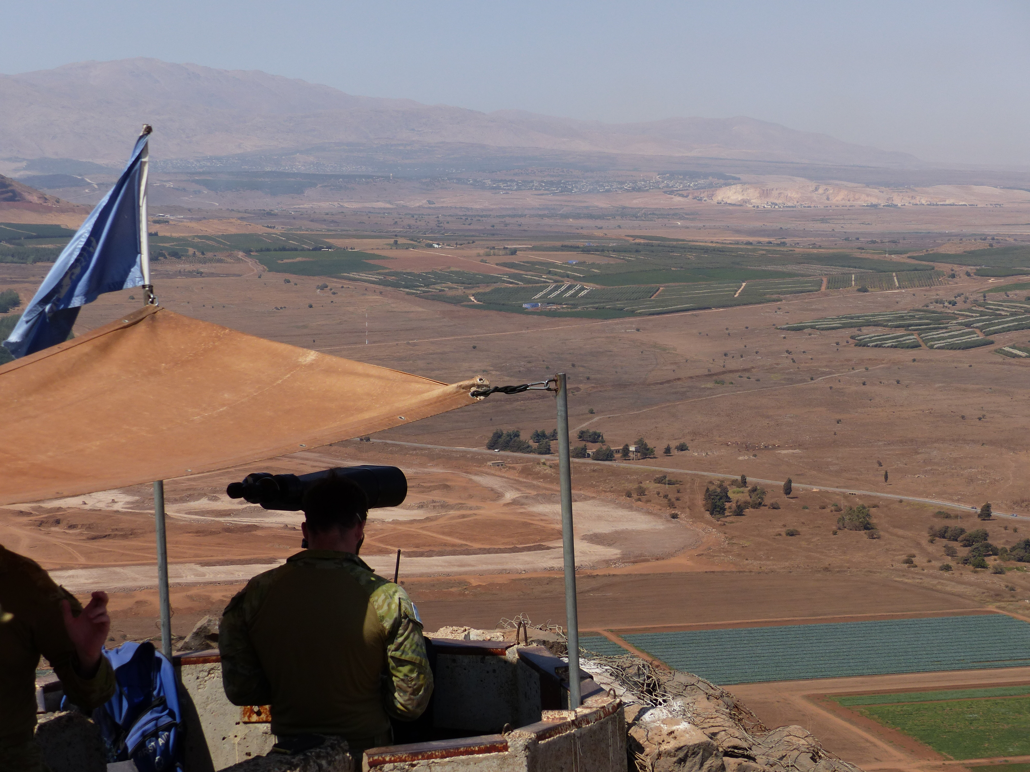 Puesto de observación de UNDOF en Bental, Altos del Golán